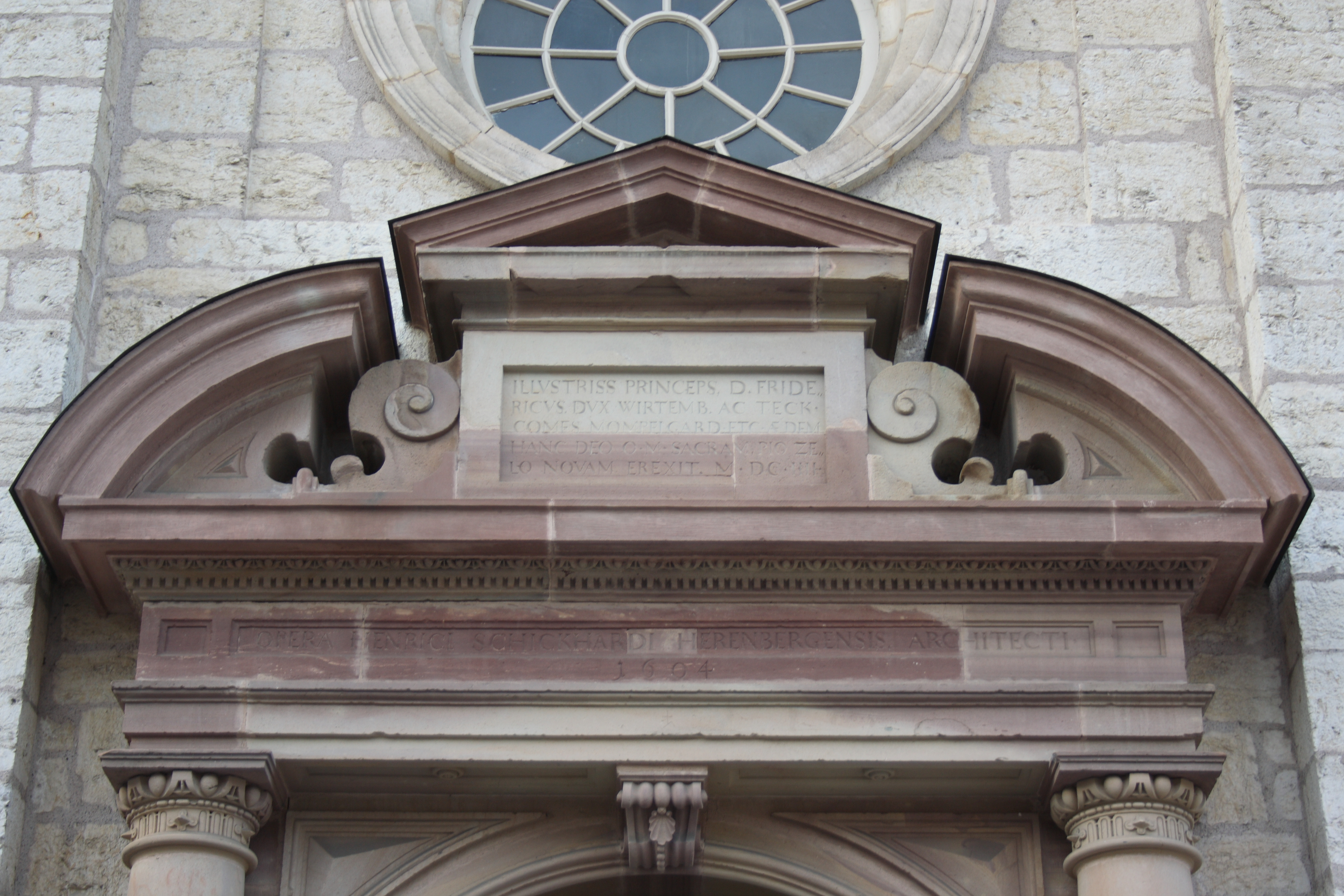 Temple Saint-Martin in Montbéliard